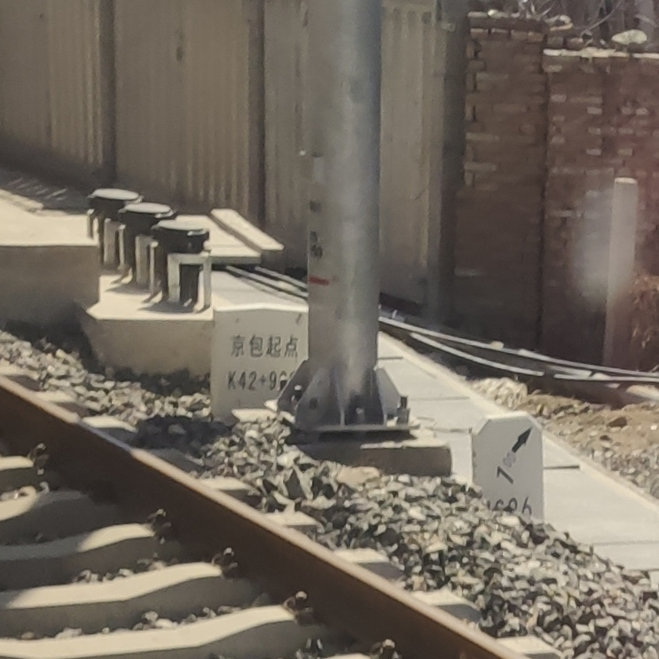 昌平站南咽喉的京包铁路实际起点标志，里程为K42+928